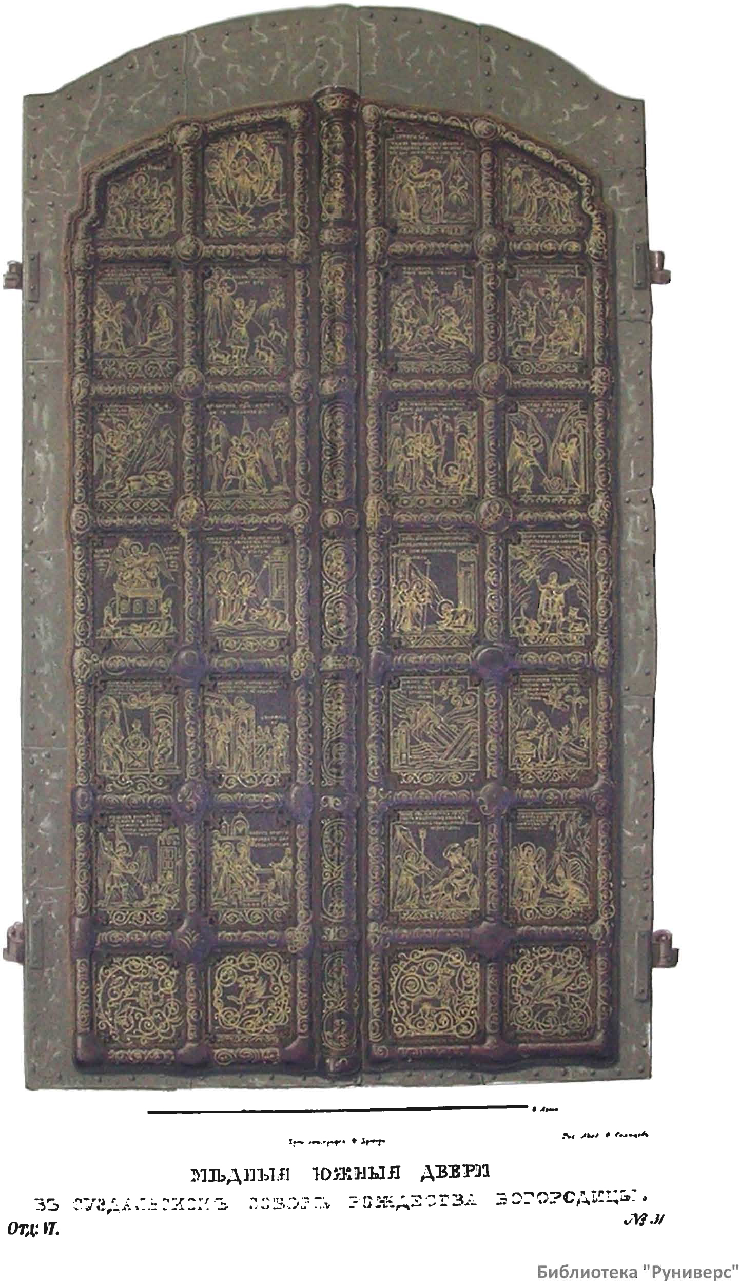 Древности Российского государства (Antiquities of Russian country), 1846—1853. Иллюстратор — Солнцев, Фёдор Григорьевич. Отделение VI. Памятники древнего русского зодчества